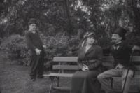 Escena de la película de Charles Chaplin A Jitney Elopement (1915).